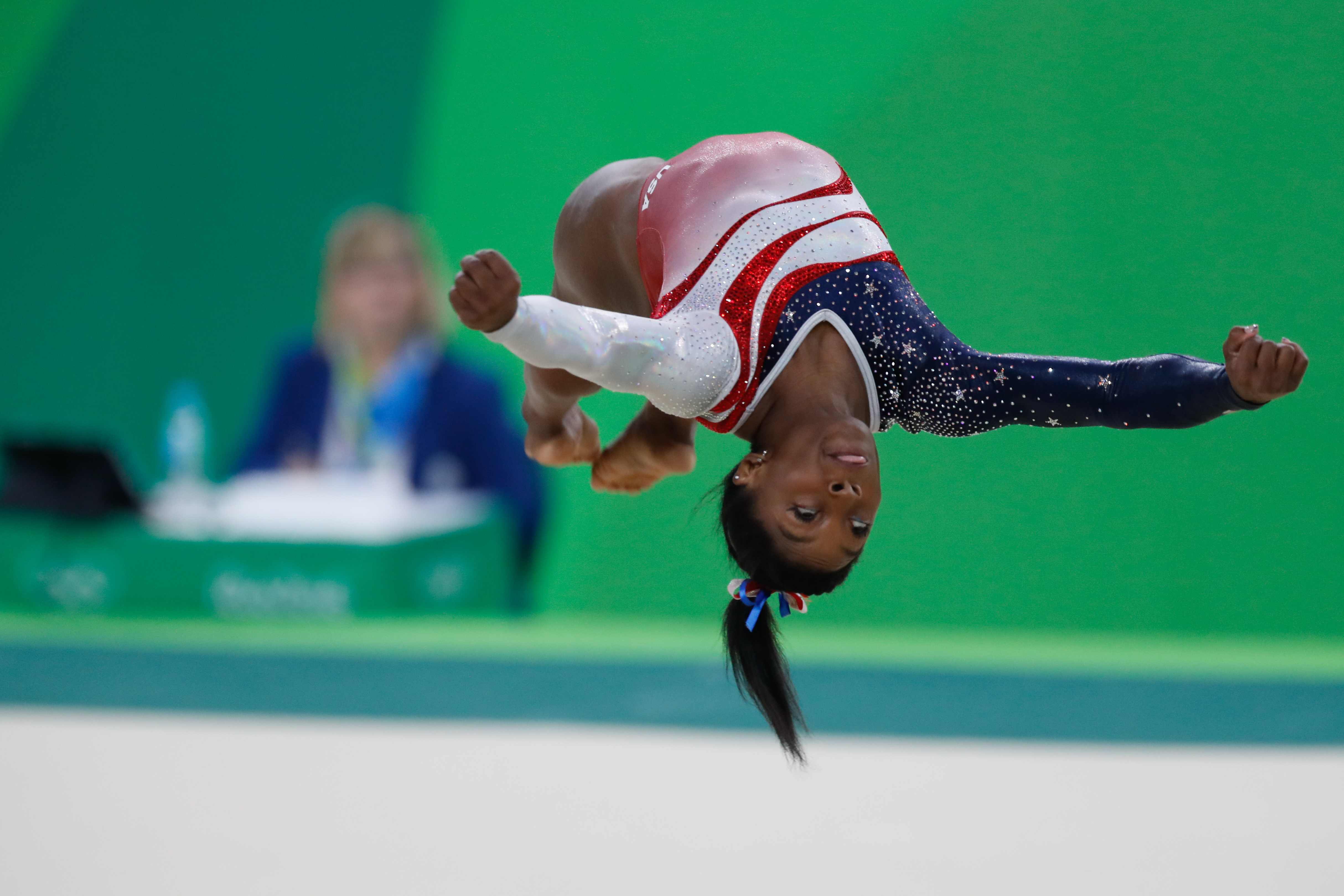 Rio de Janeiro - Simone Biles, ginasta dos Estados Unidos, durante final em que levou medalha de ouro na disputa por equipes feminina nos Jogos Olímpicos Rio 2016. (Fernando Frazão/Agência Brasil)